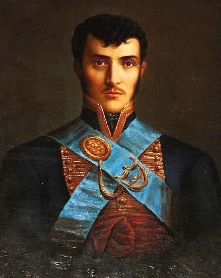 Crnel. Carlos de Montúfar y Larrea. Prócer de la Independencia ecuatoriana, Comisionado de Regencia para Nueva Granada enviado por la Junta de Cádiz en 1810, creador del Estado de Quito (1810-1812), soldado del ejército bolivariano. Óleo sobre lienzo del pintor Manuel Salas Alzamora, expuesto en el Salón de los Próceres del Palacio de Najas (Cancillería).